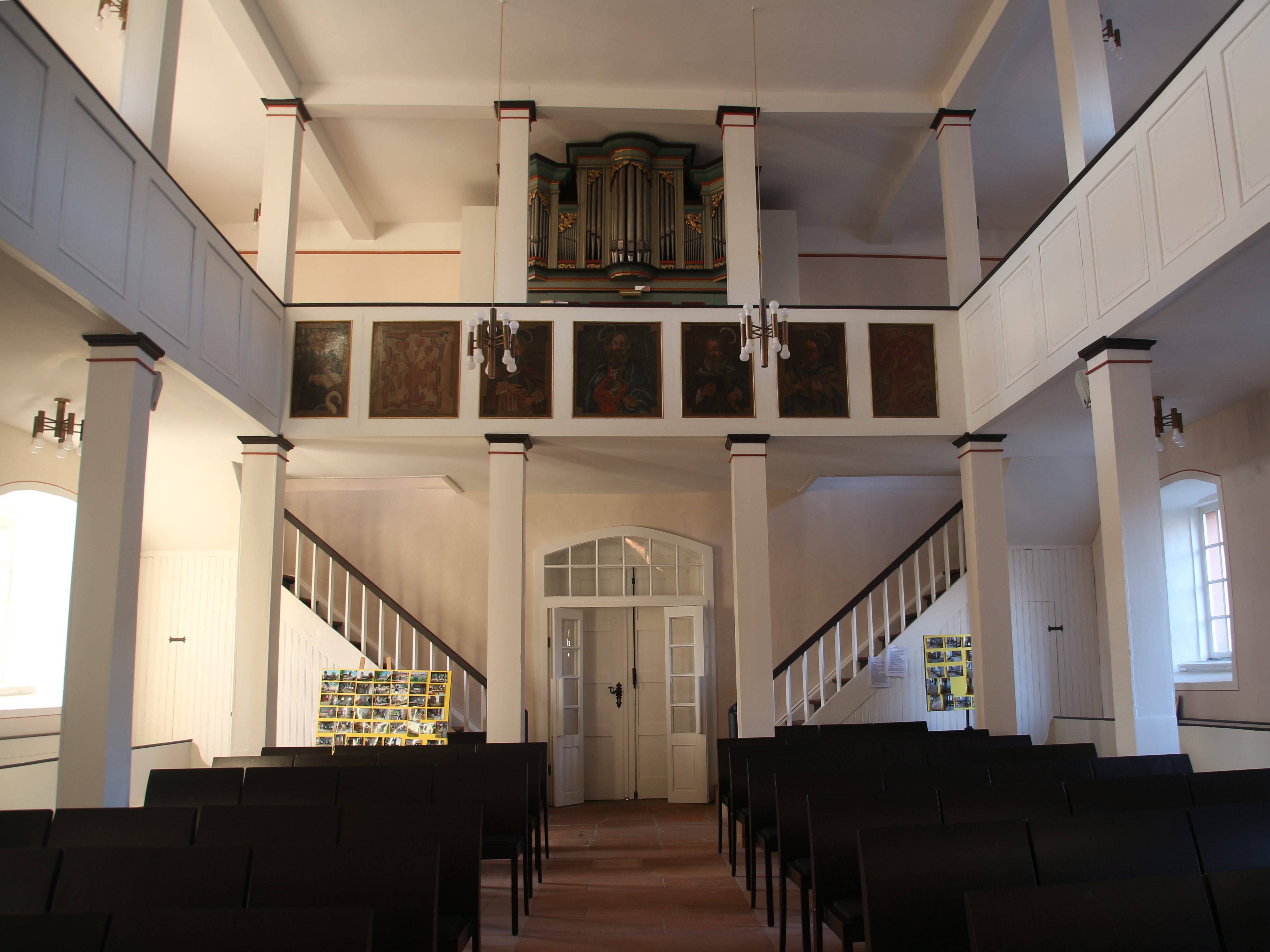 Evangelische Kirche Sterzhausen, Gemeinde Lahntal, Landkreis Marburg-Biedenkopf, Hessen